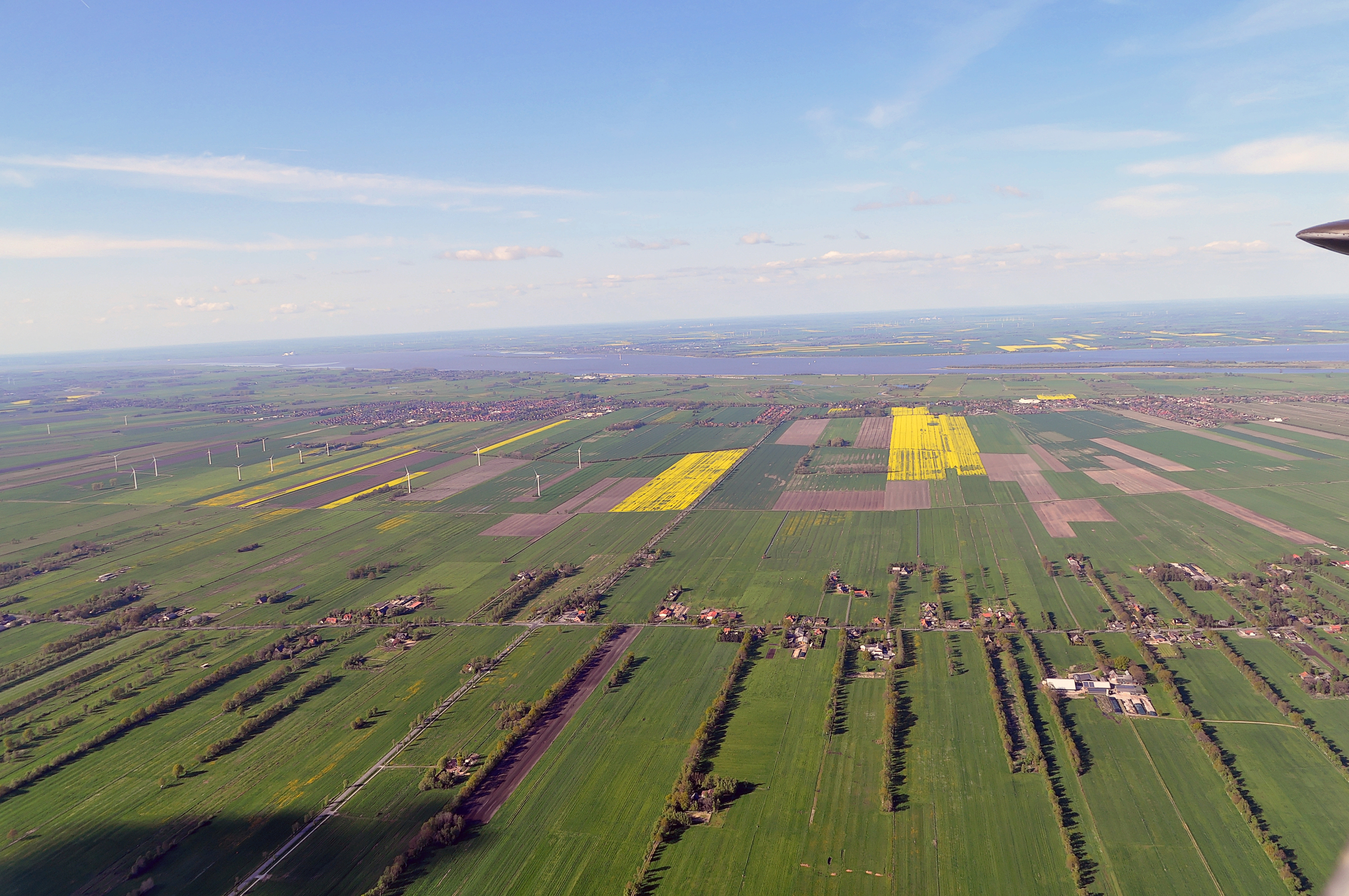 Luftbilder von der Nordseeküste 2012-05